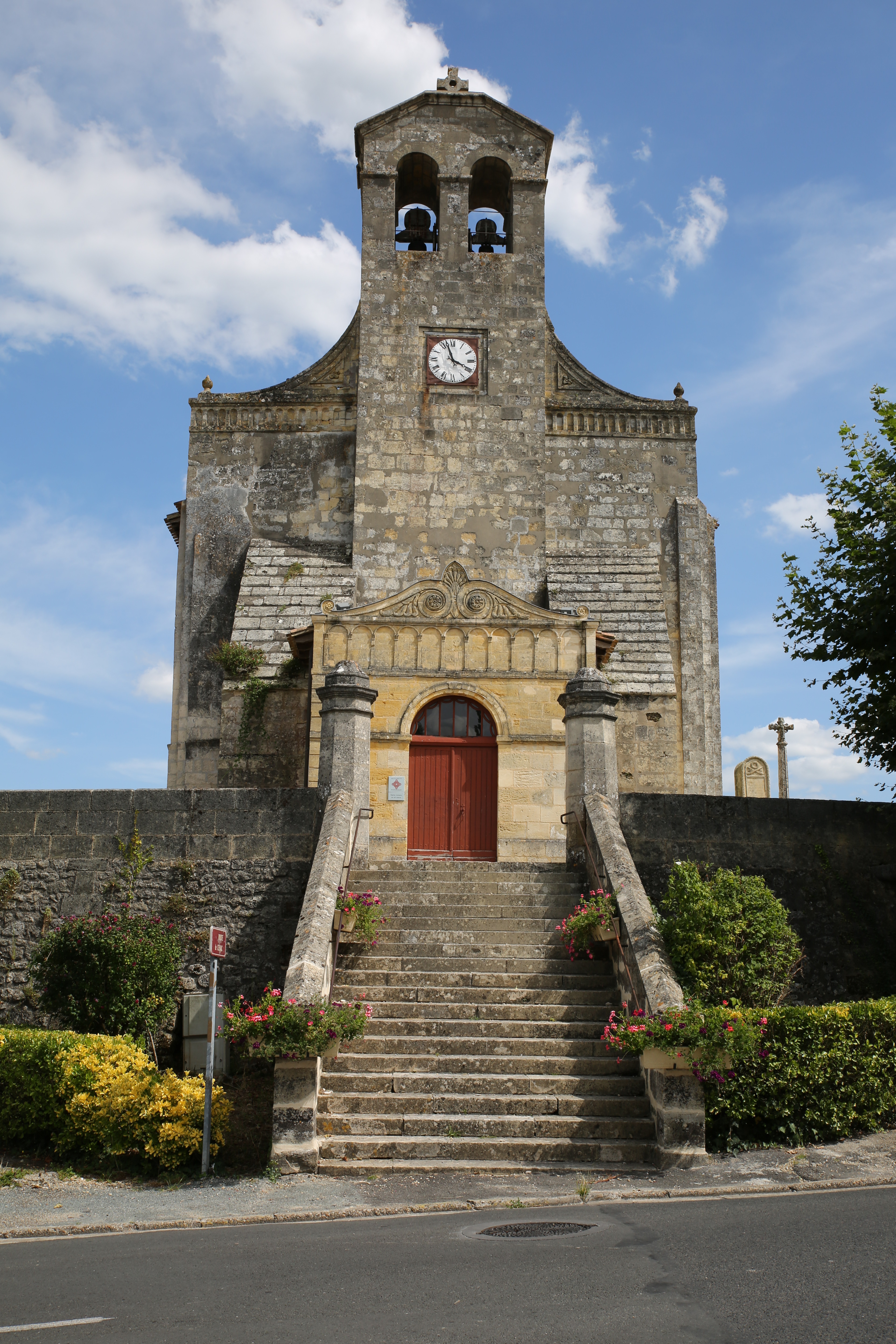 Église de Saint-Caprais-de-Bordeaux